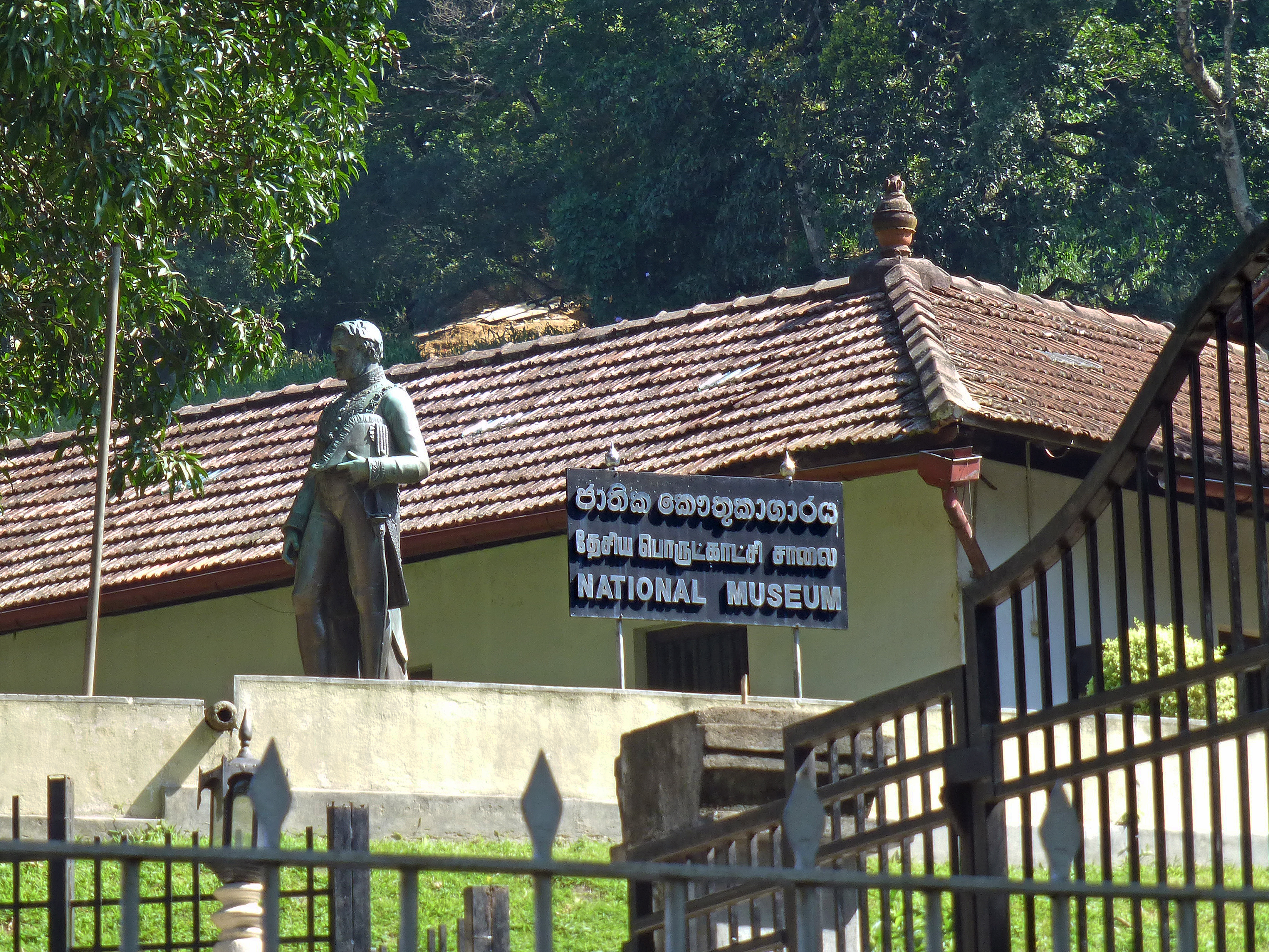 Vue sur le Kandy National Museum (Sri Lanka)